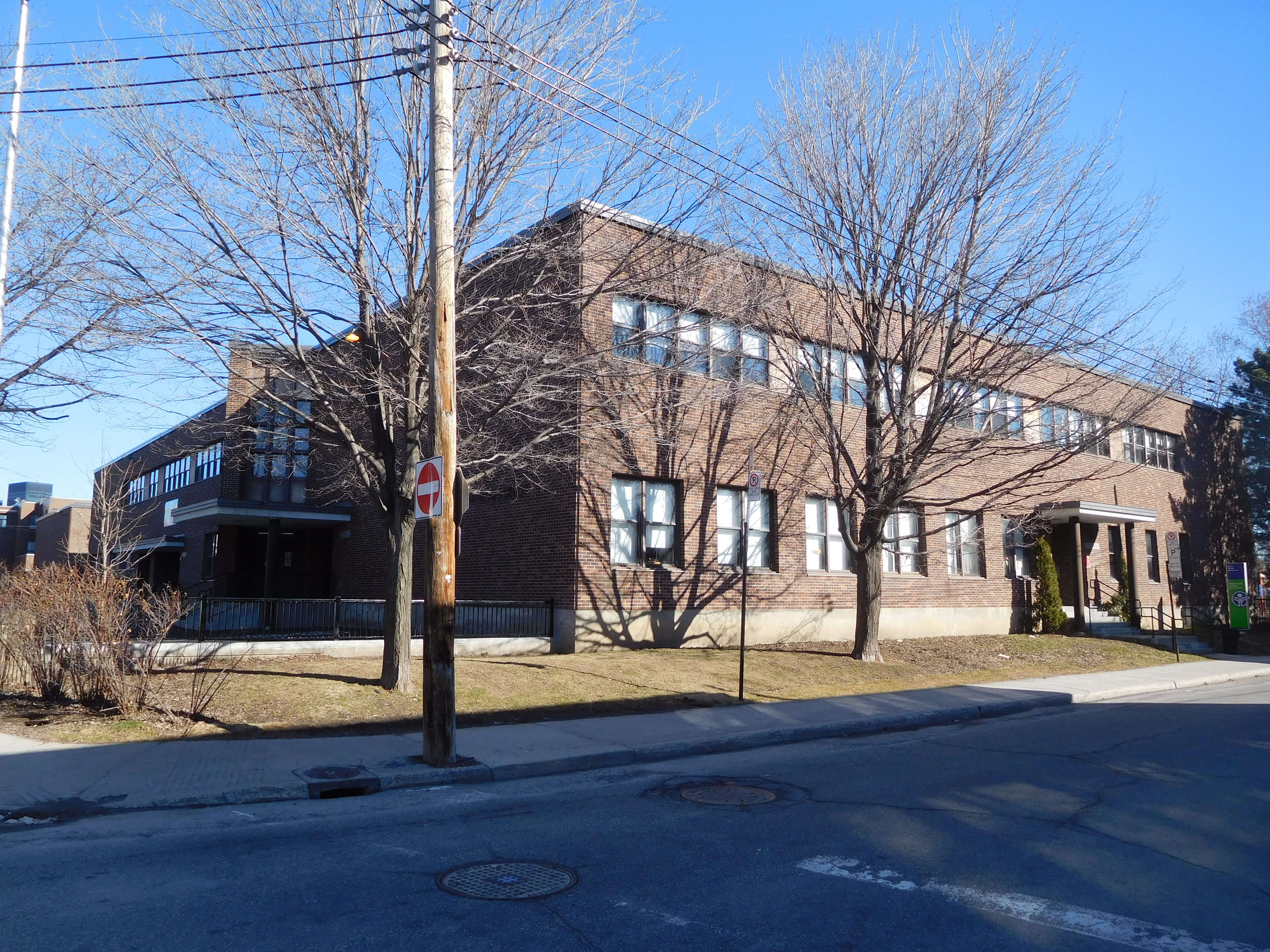 École Victor-Rousselot, 3525, rue Sainte-Émilie, Montréal